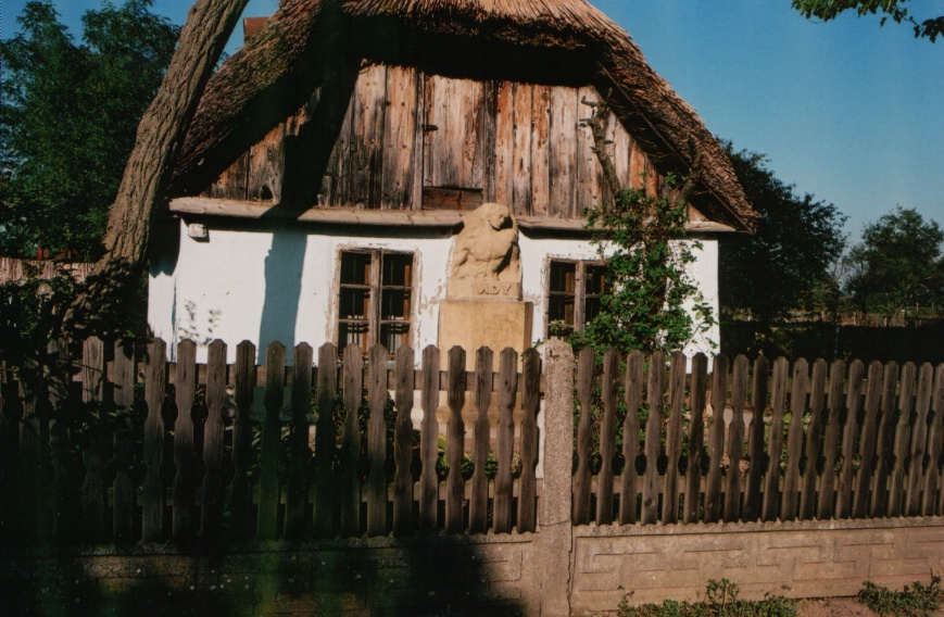 Ady Endre szülőháza, Érmindszent